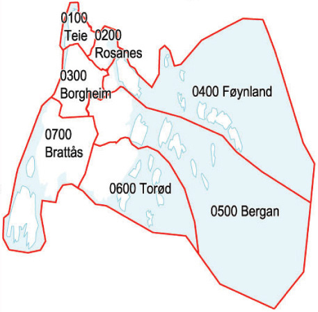 Statistiske delområder i Nøtterøy kommune (per 3. november 2001)